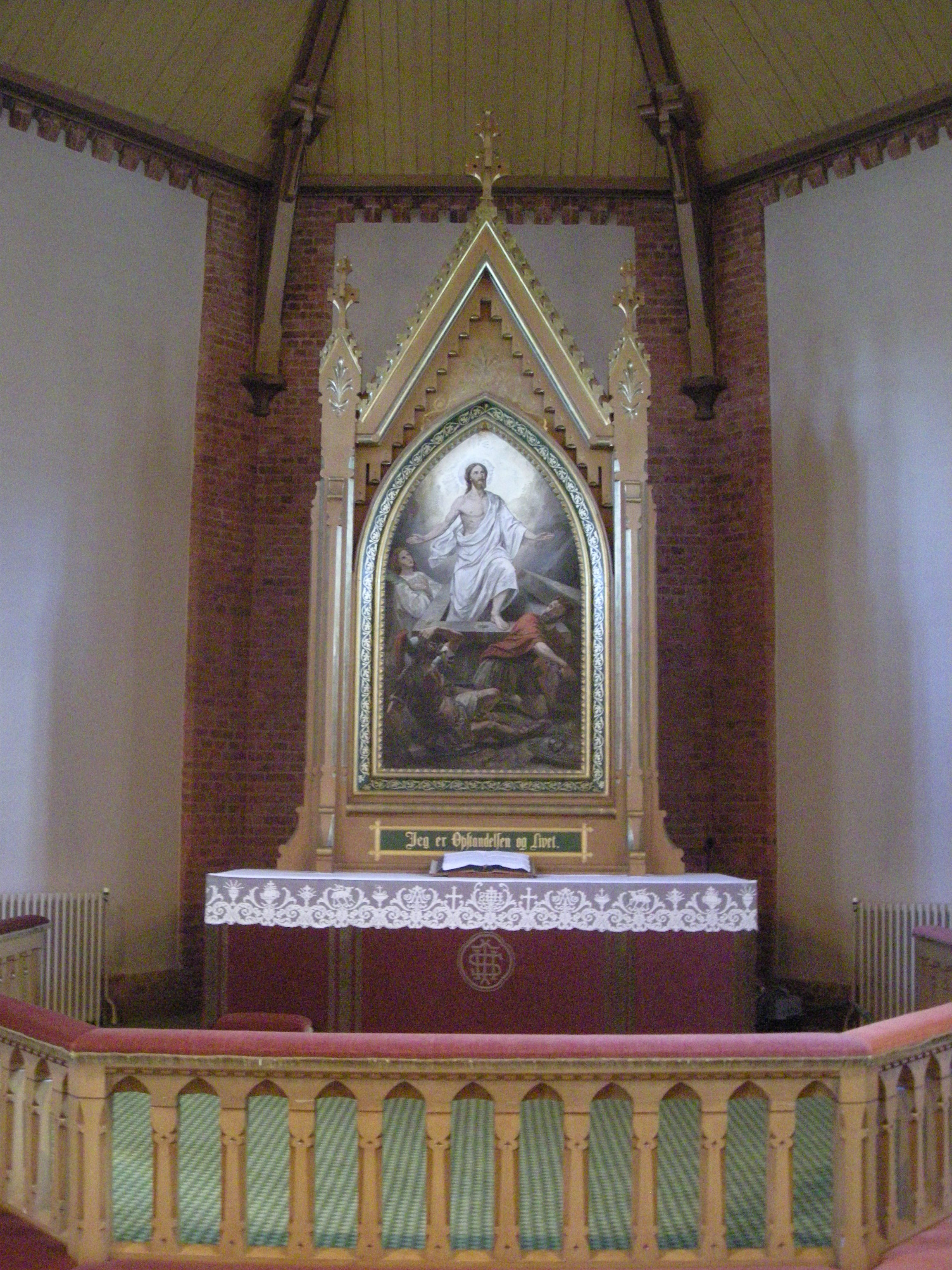 Altertavlen i Onsøy kirke, malt av Christen Brun i kopi etter Adolph Tidemands alterbilde i Bragernes kirke.